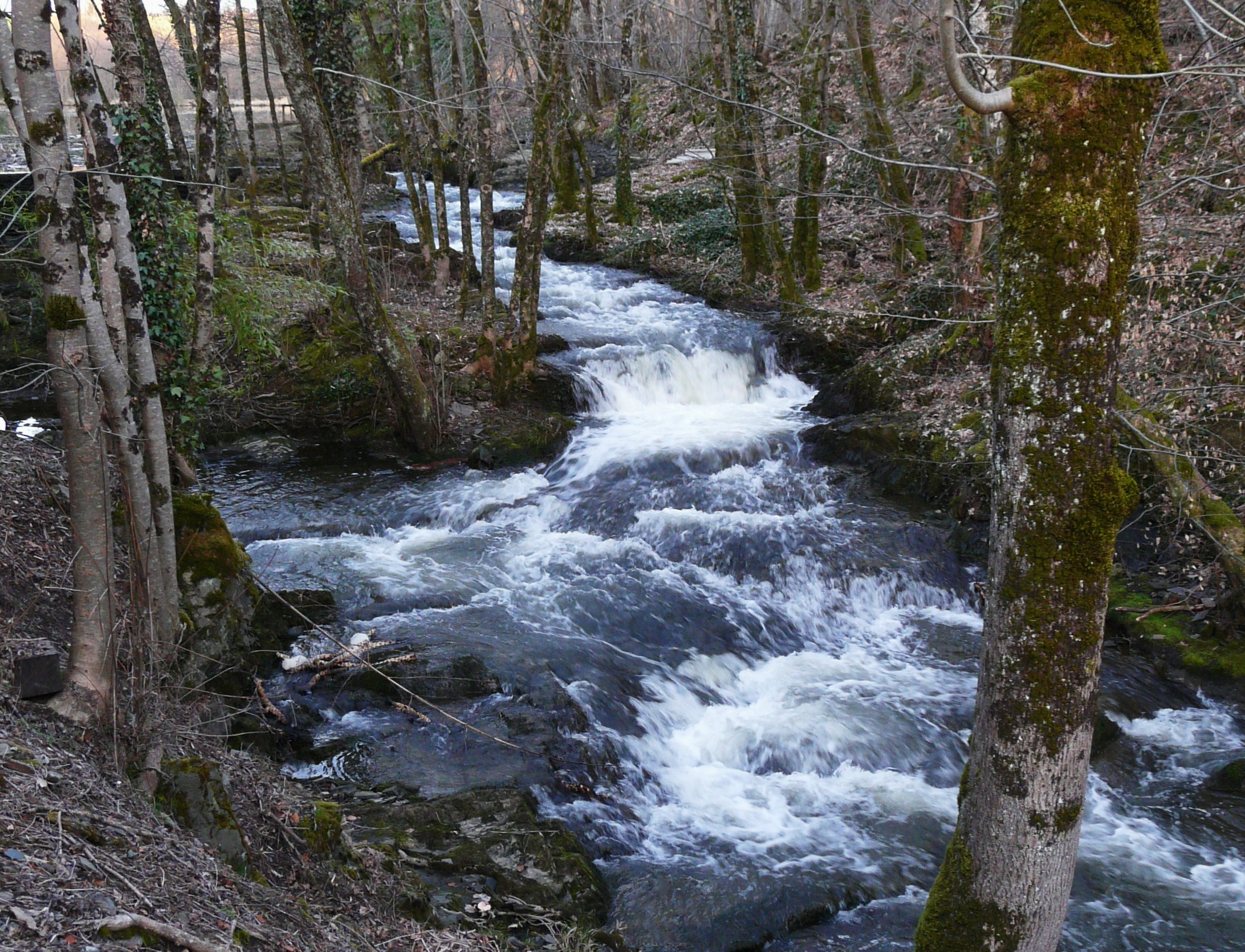 Ruisseau la Haute Loue à Miremont, en limite de Lanouaille et Savignac-Lédrier, Dordogne, France